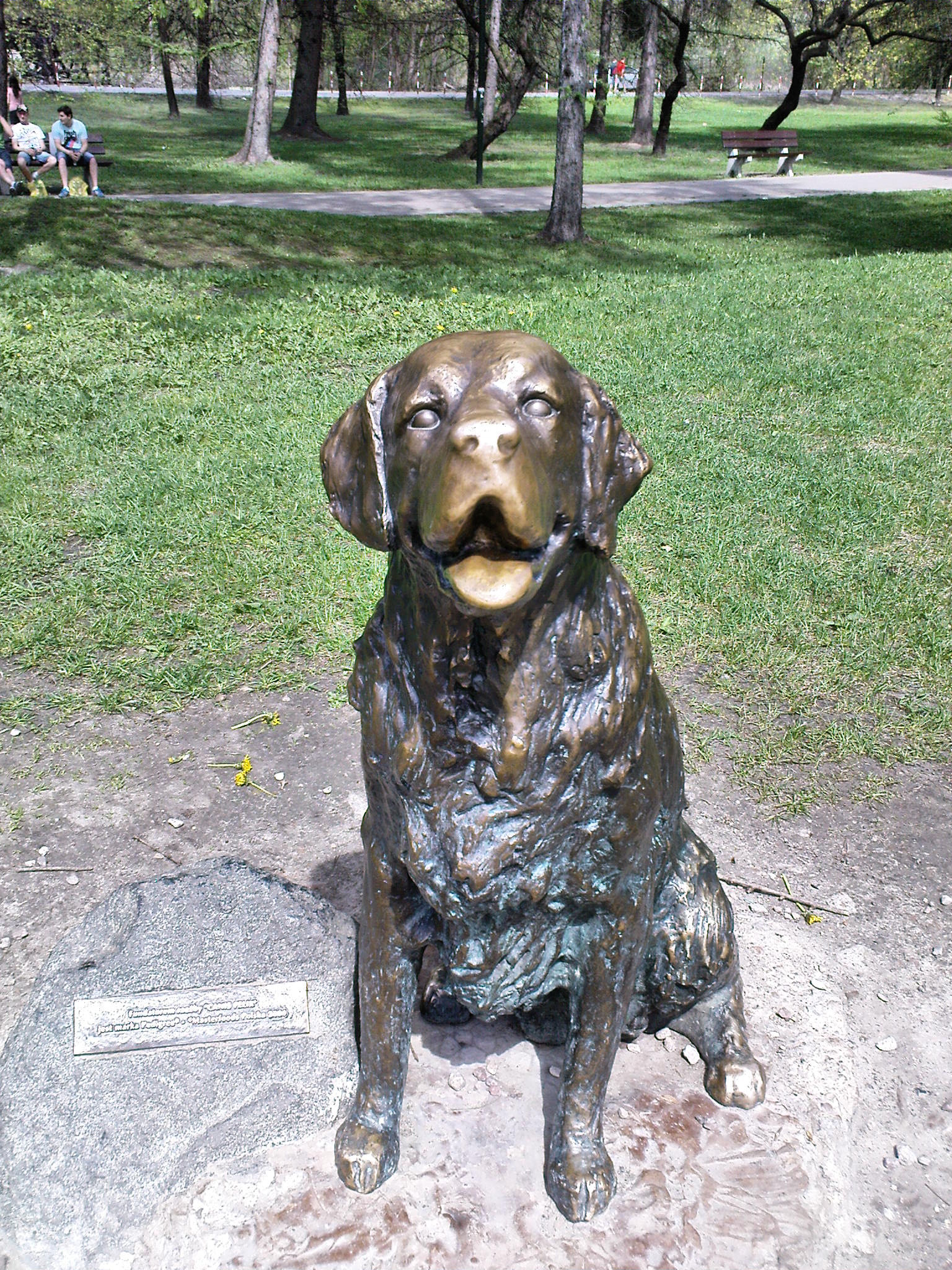 Pomnik szczęśliwego psa autor: Bogna Czechowska